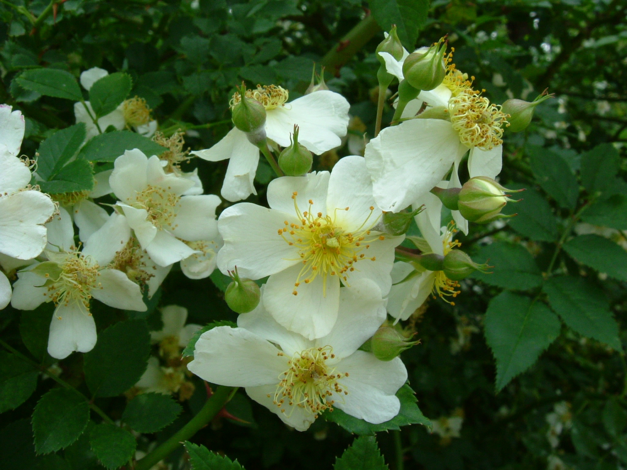 ロサ ウィルギ二アナ（フジイバラ）Rosa luciae var. fujisanensis, flowers and buds